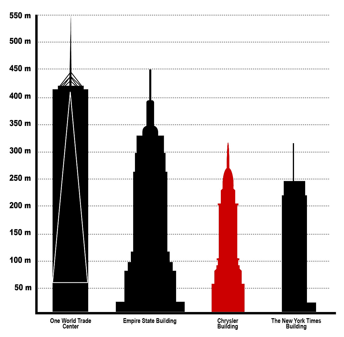 Tabella di comparazione altezze grattacielo Chrysler